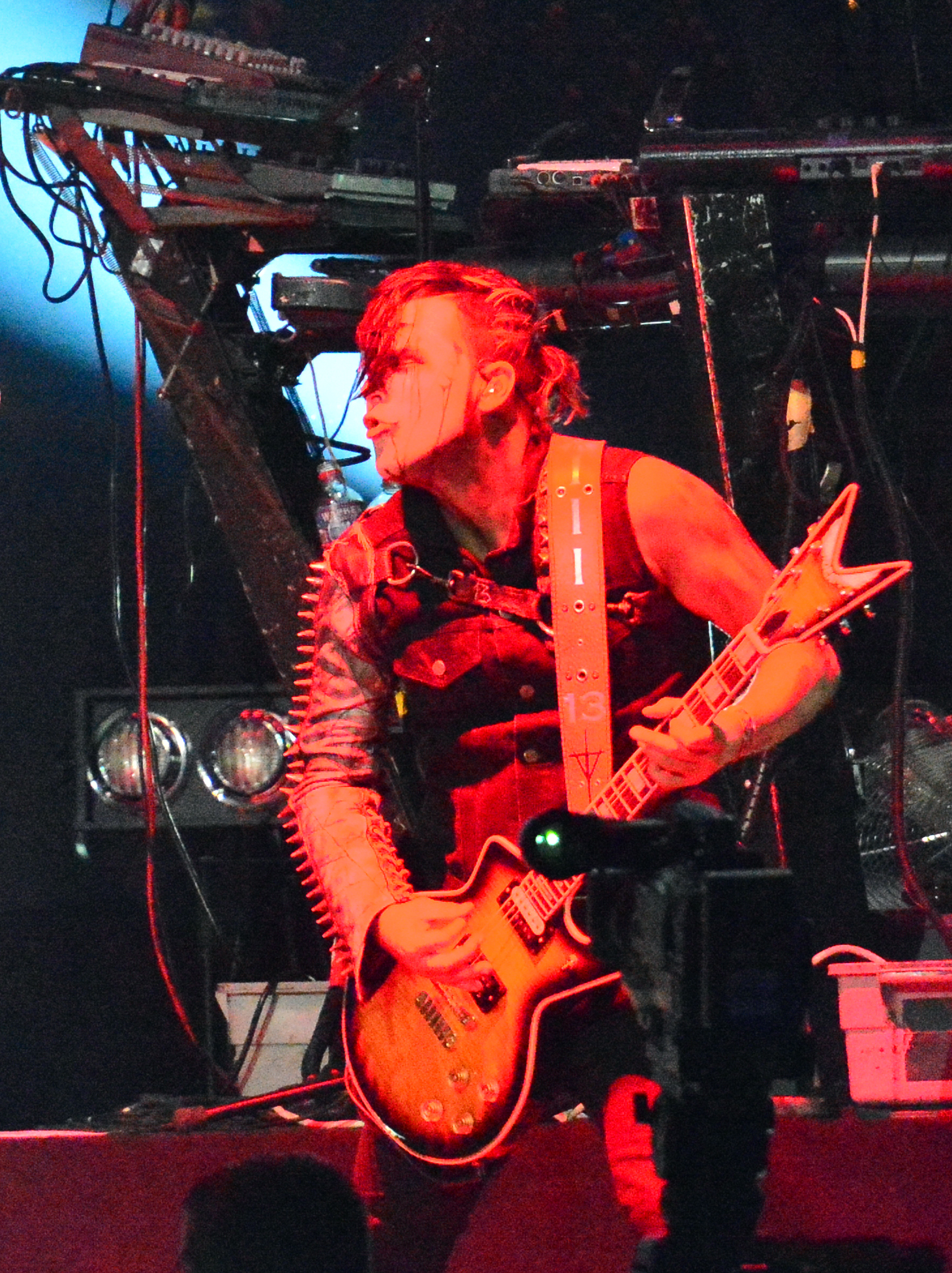 Combichrist beim Wacken Open Air 2015